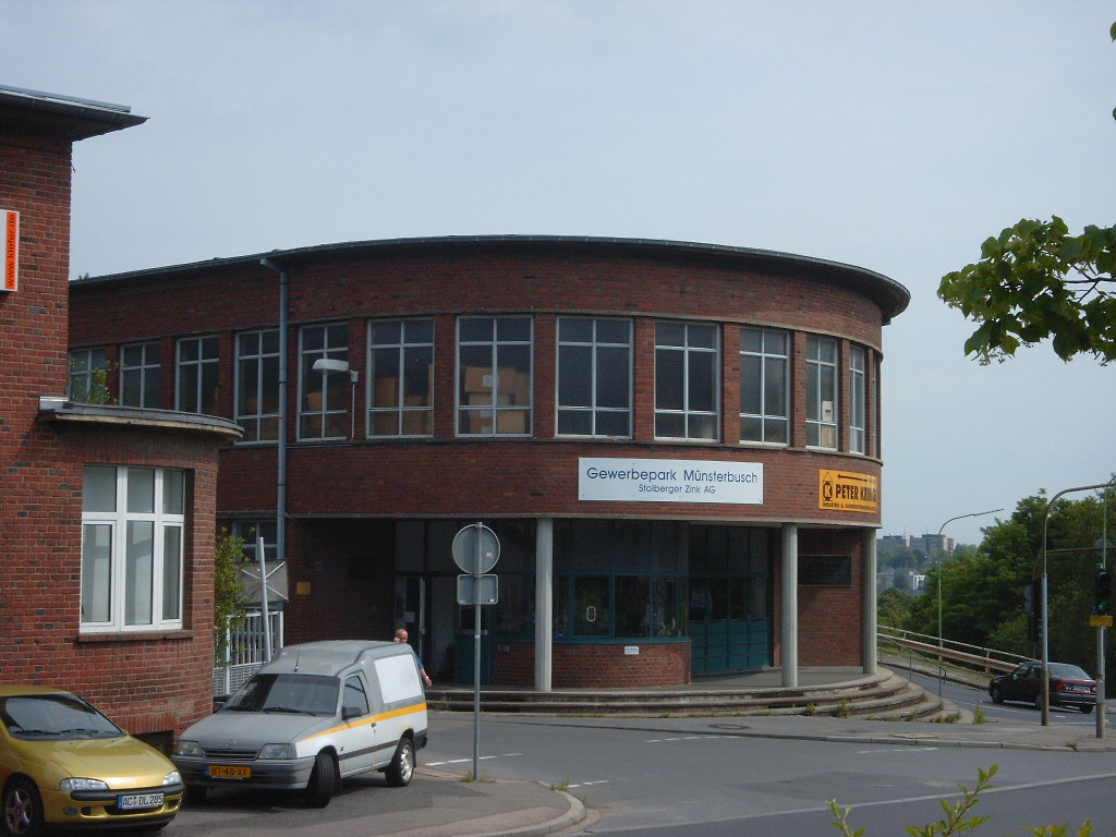 Stolberg, Gewerbepark Münsterbusch (früher Zinkwerk)